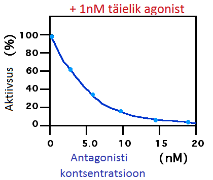 Retseptori blokeerimine antagonisti poolt